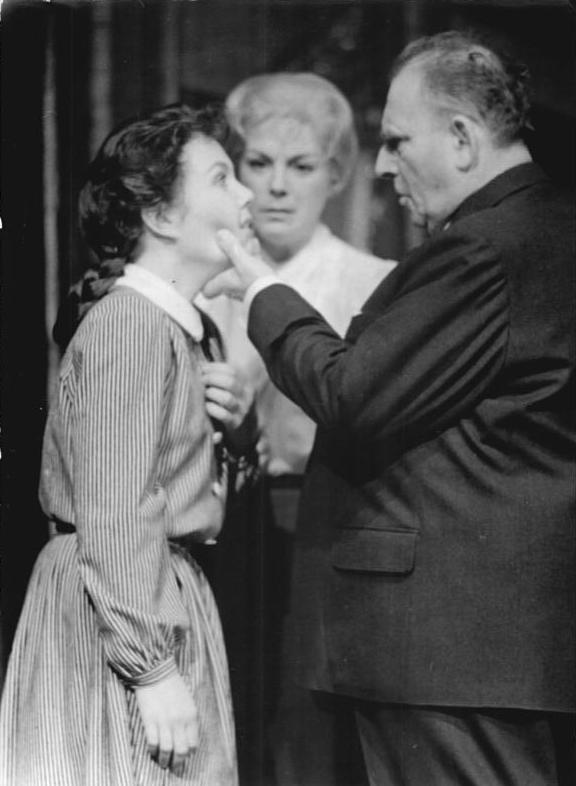 Zentralbild Hochneder NL-Noa 19.12.1959 Premiere des Schauspiels "Professor Mamlock" in den Berliner Kammerspielen. Am 21.12.1959 findet in den Kammerspielen des Deutschen Theaters in Berlin die Premiere des Schauspiels "Professor Mamlock" von Friedrich Wolf statt. UBz: Eine Szene aus dem Schauspiel. Professor Mamlock (Wolfgang Heinz), seine Frau Ellen (Ursula Burg) und seine Tochter Ruth (Karola Ebeling)."